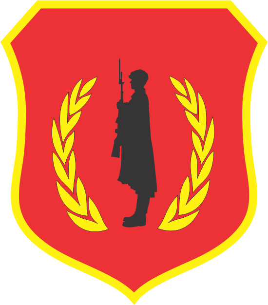 Ознака на Баталјонот за почести при Армијата на Република Македонија